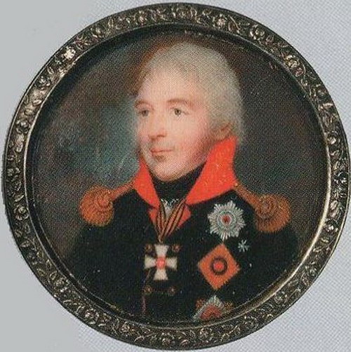 Князь Сергей Федорович Голицын (1749-1810)